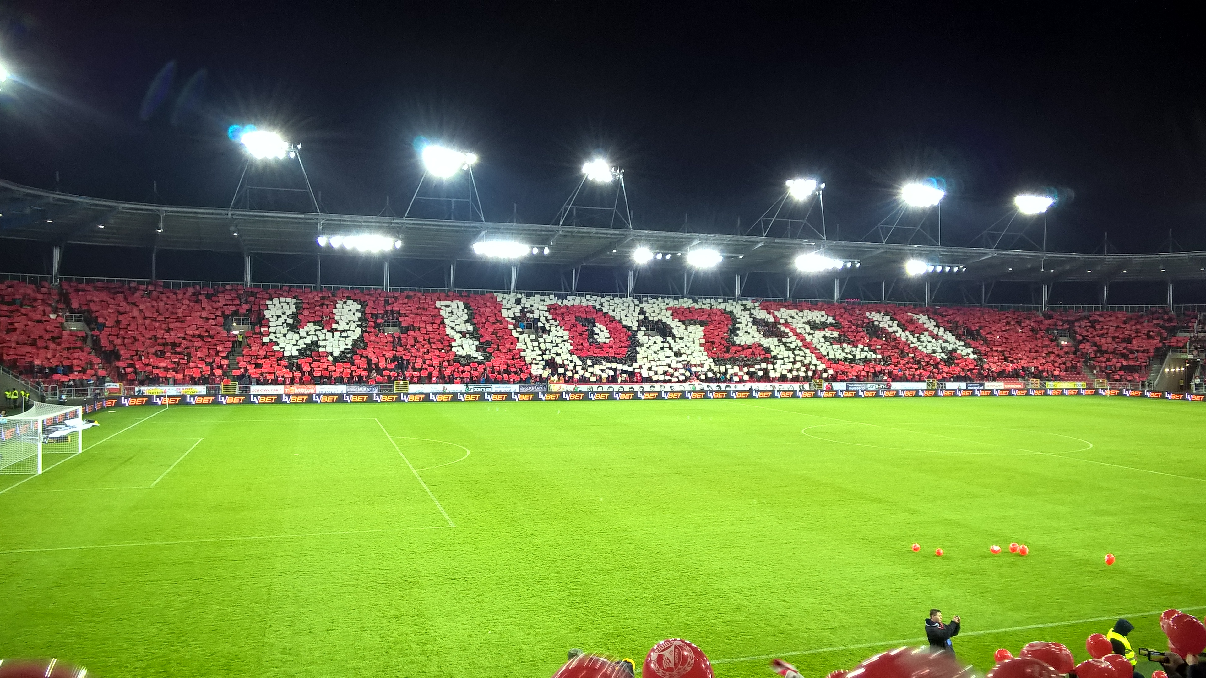 Otwarcie stadionu Widzewa - 18.03.2017